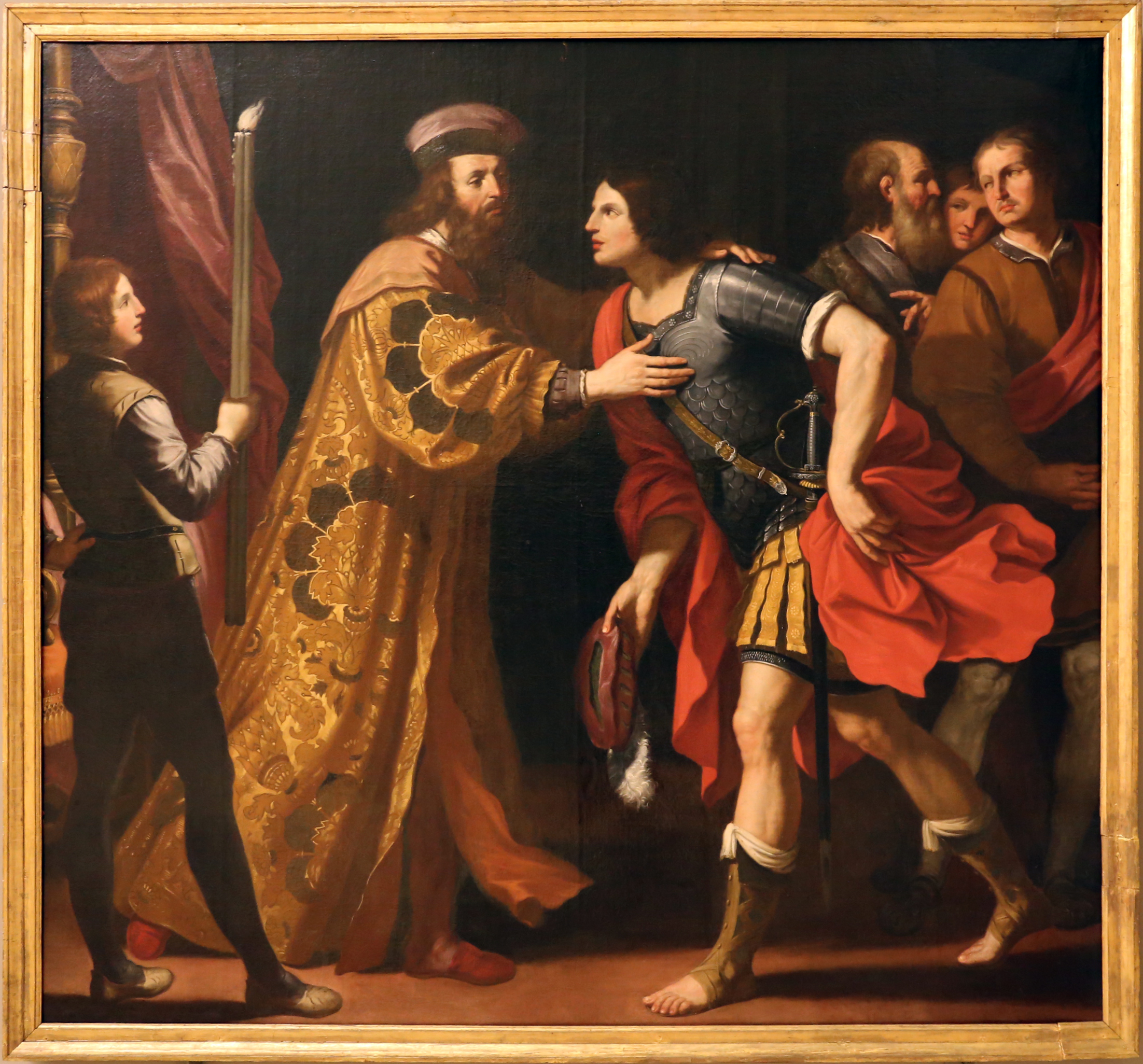 Palazzo dei Musei (Modena) This is a photo of a monument which is part of cultural heritage of Italy.